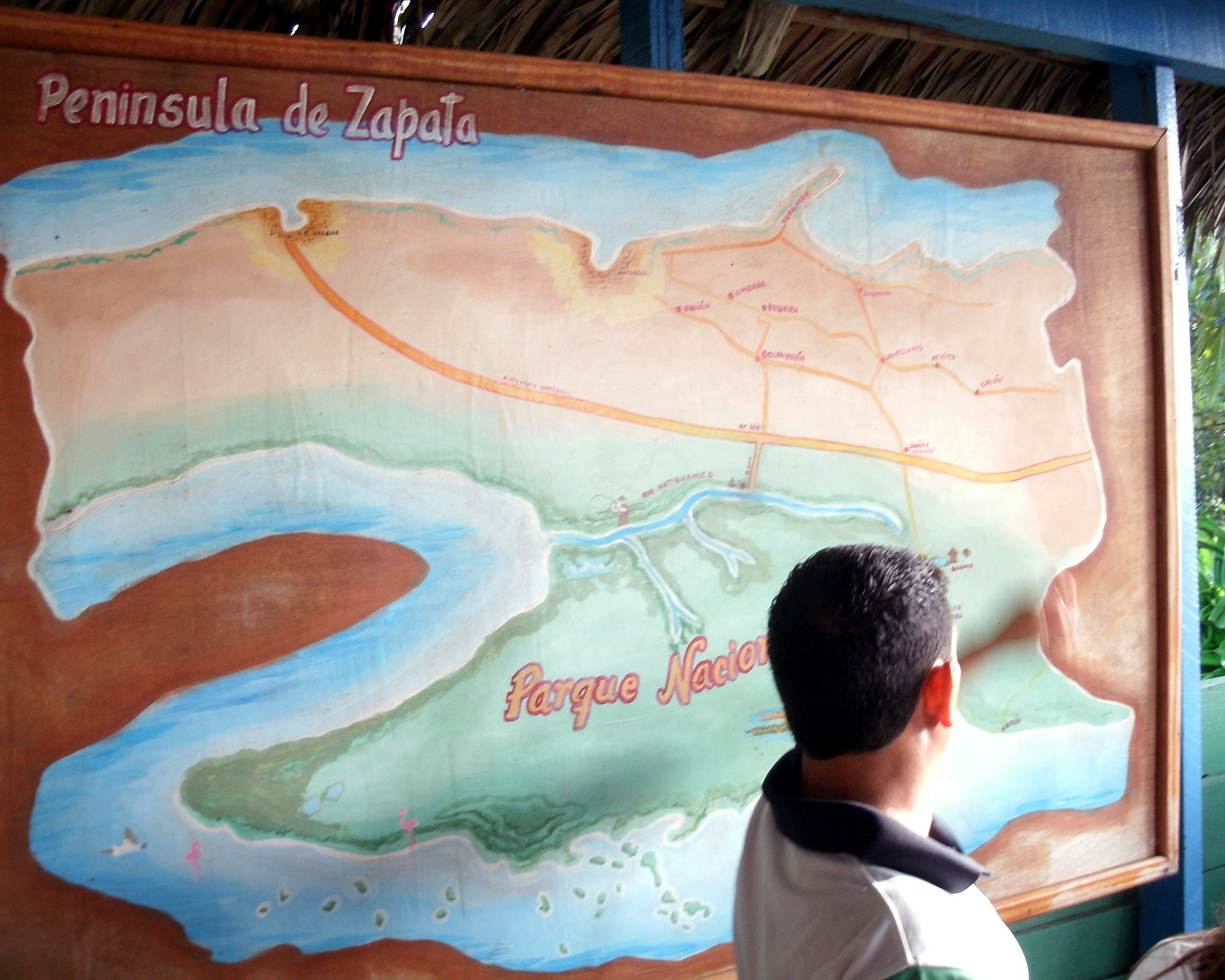 Schéma de la péninsule de Zapata - Province de Matanzas, Cuba.